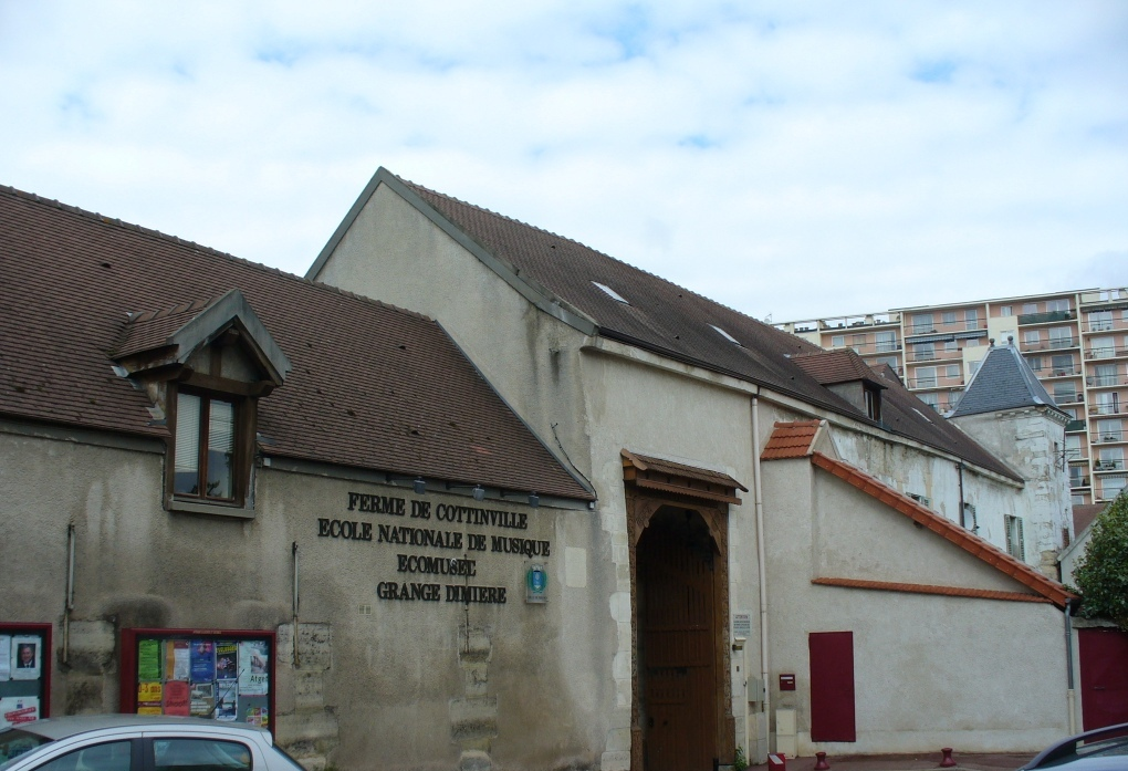 Musée de Fresnes